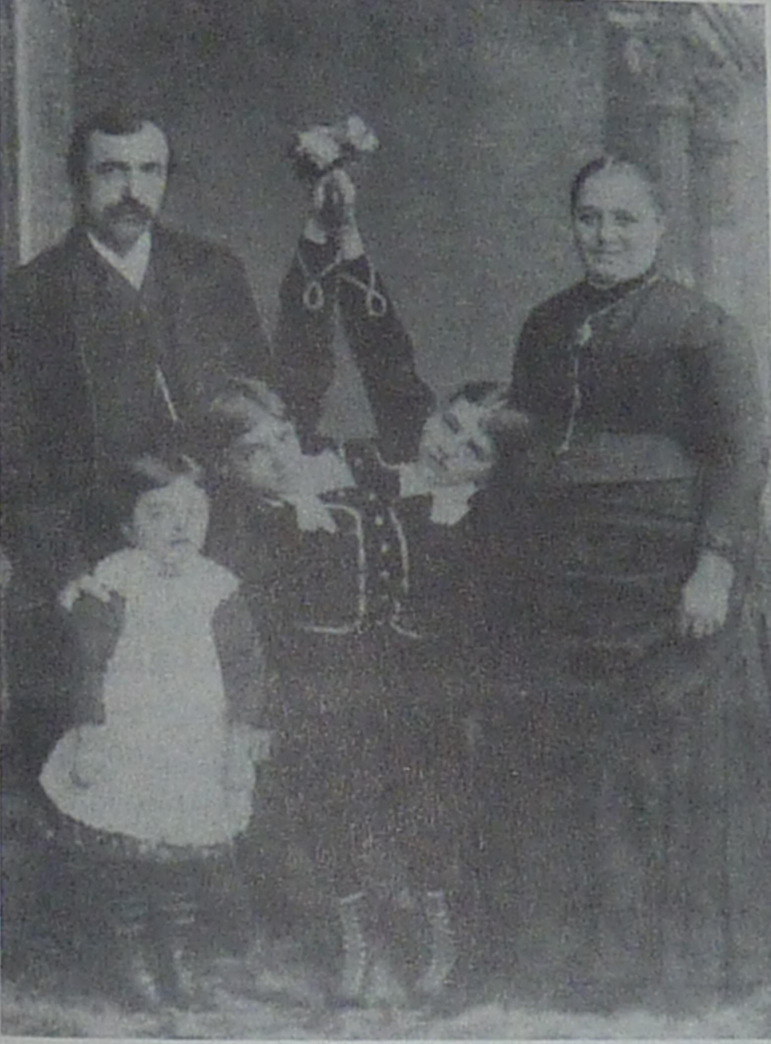 die Tocci-Zwillinge mit ihren Eltern und einem ihrer jüngeren Geschwister in Berlin